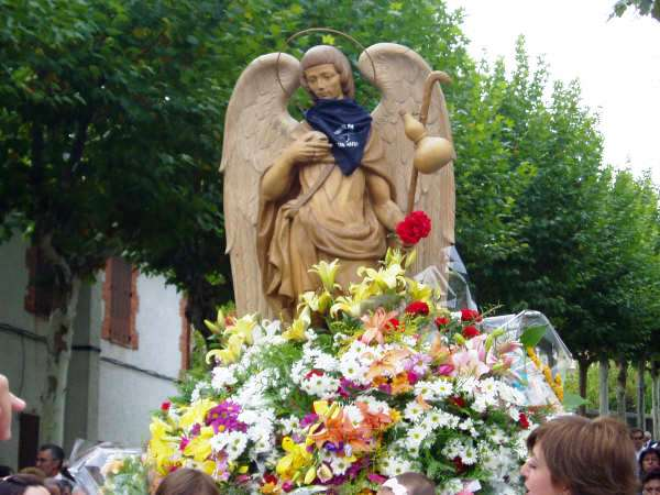 El arcángel San Rafael es el patrón de la localidad segoviana de San Rafael (España). Por ello, en sus fiestas patronales se saca al arcángel en procesión cada 29 de septiembre.